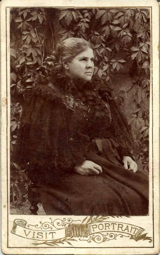 Elena Grigorescu 1831 (?) - 1917 (?)